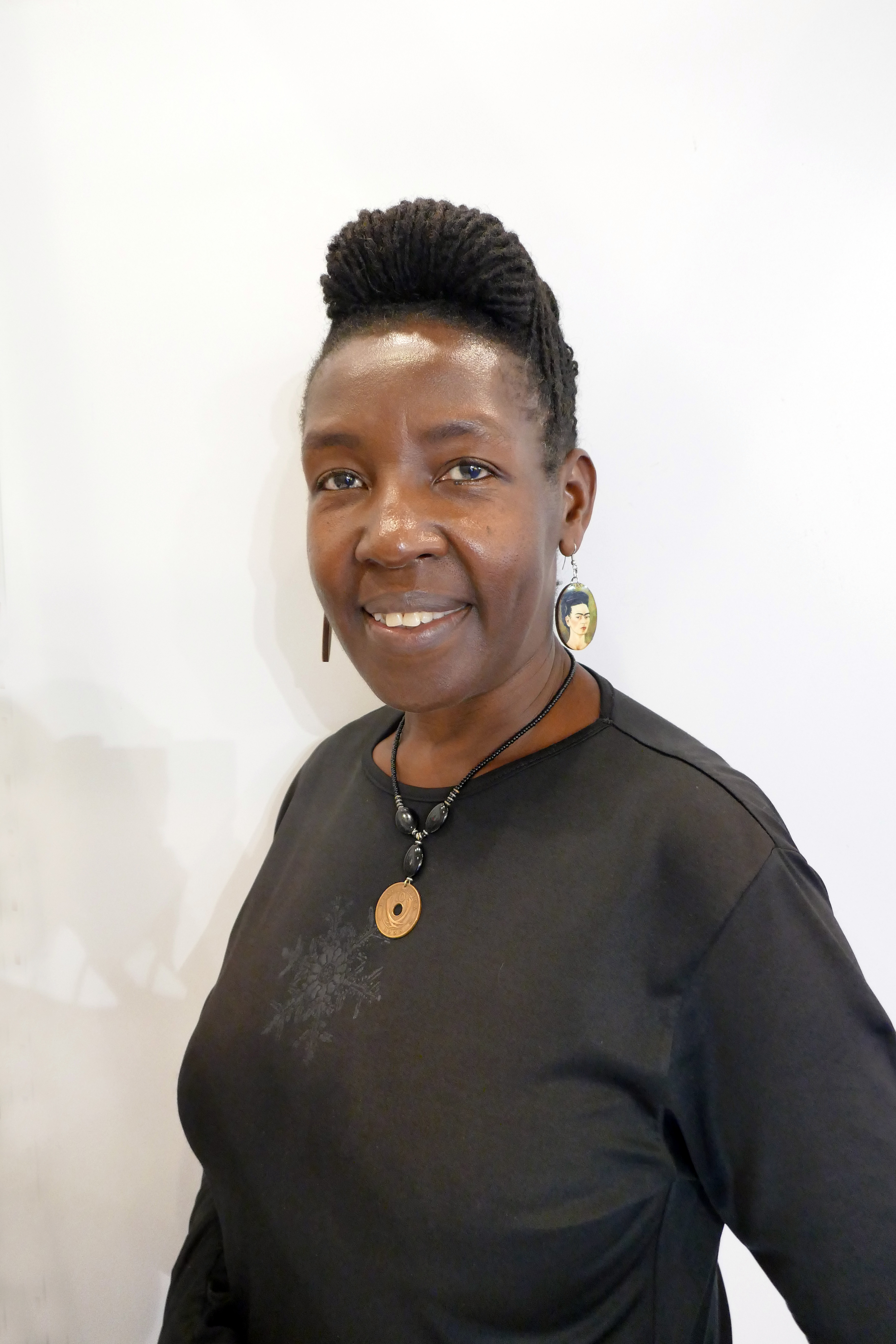 Hilda Twongyeirwe, femme de lettres ougandaise, à la Foire du livre de Francfort 2017.